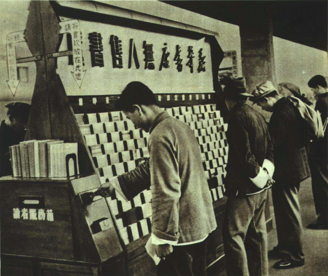 1952年新华书店上海北站无人售书处。